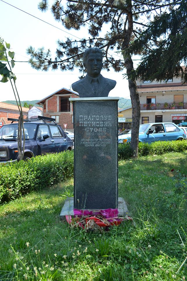 Bista Dragoljuba Petkovića u Vlasotincu